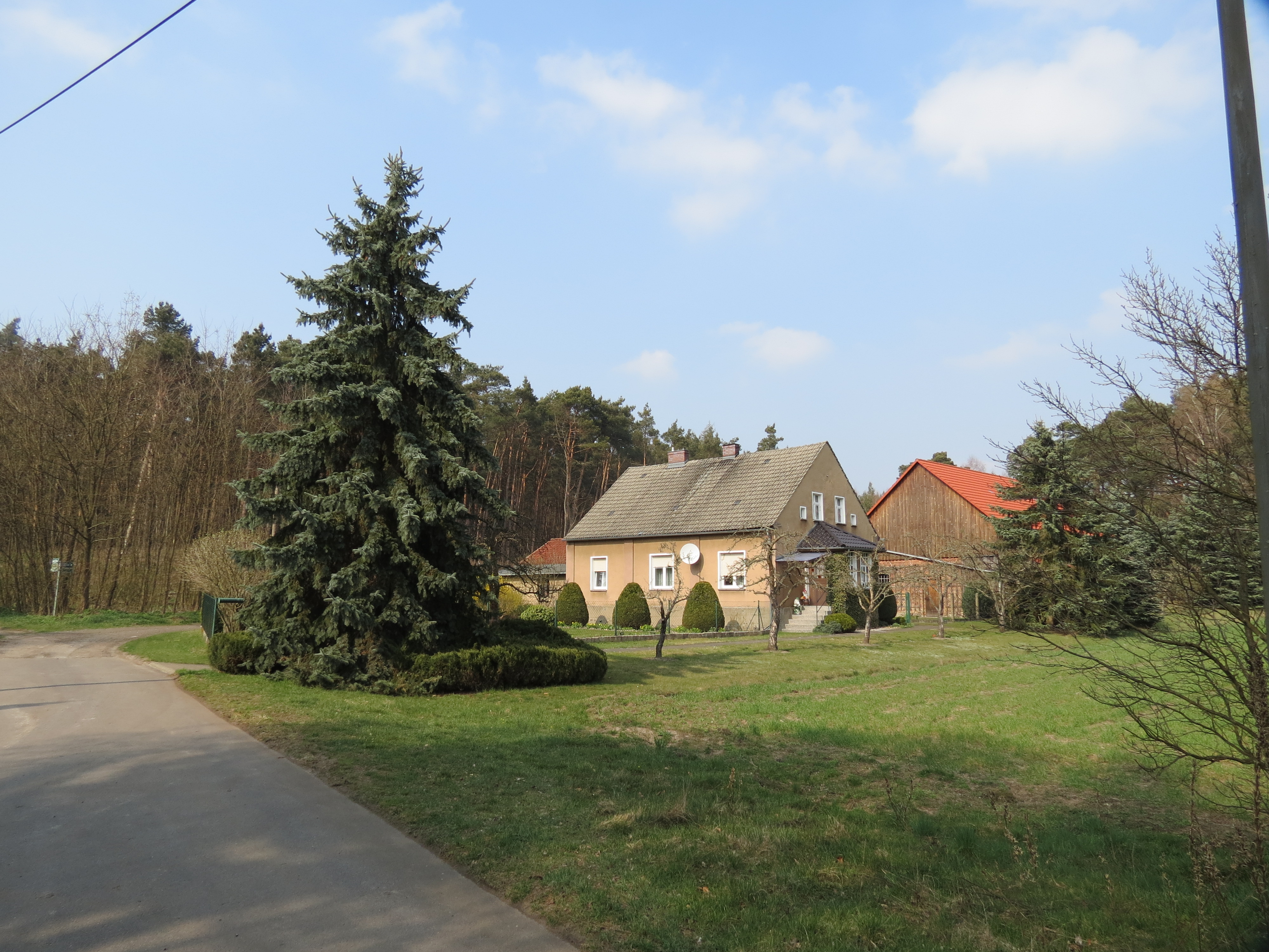 Baroldmühle, Wohnplatz im Ortsteil Doberburg der Stadt Lieberose, Lkr. Dahme-Spreewald, Brandenburg, Deutschland, westlicher Teil des Wohnplatzes, Blick von Osten nach Westen